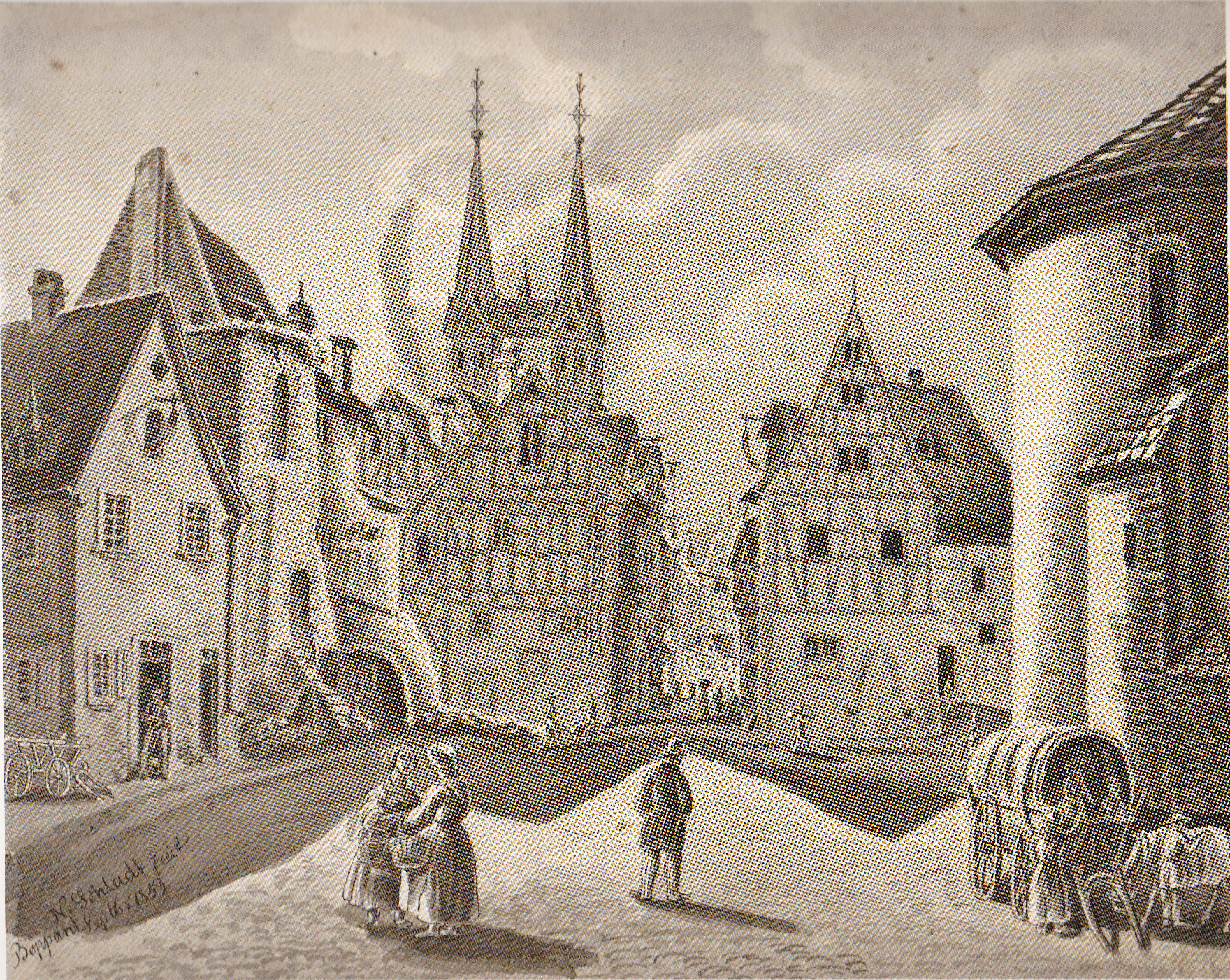 Der Burgplatz vor der kurfürstlichlichen Burg von Boppard um 1853